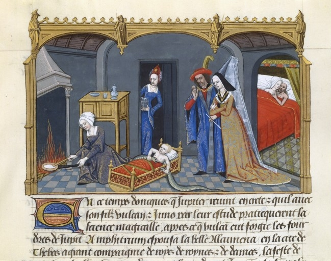 RC-C-14536 légende Conception d'Hercule. Hercule enfant étranglant les serpents département Manuscrits occidentaux cote du document FRANCAIS 252 période du document XVIème siècle date du document ou du recueil 14..-15.. partie de Recueil des histoires de Troyes. - Cognac folio, pagination Folio 73 auteur(s) Testard, Robinet (Enlumineur) Le Fèvre, Raoul (14..-14..) (Auteur